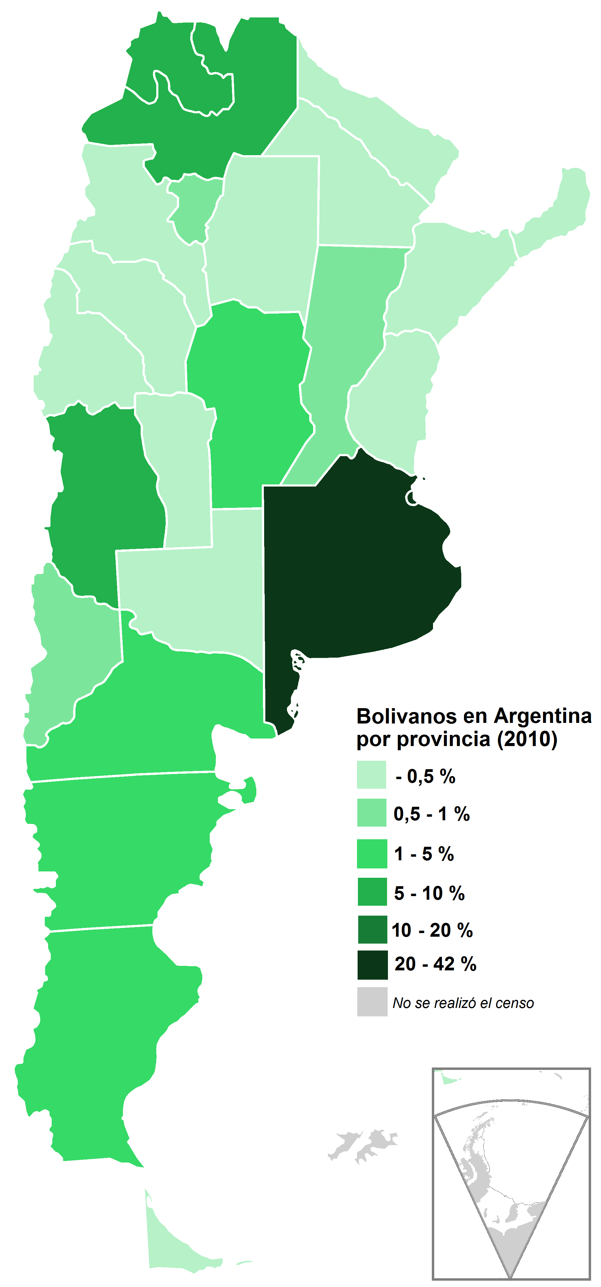 República Argentina por provincia. Población nacida en Bolivia, en porcentaje. Año 2010. Fuente: Censo 2010 - INDEC.